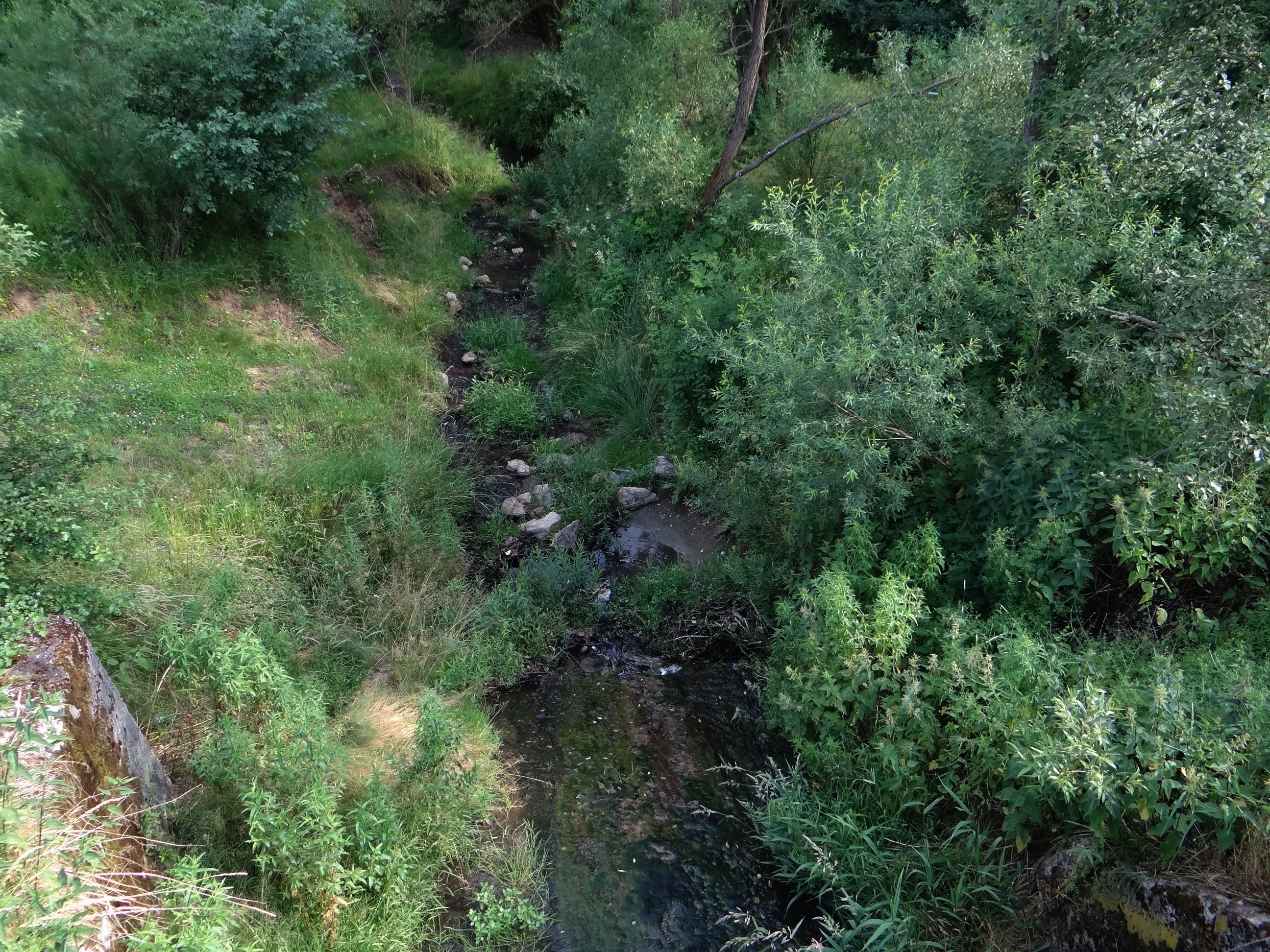 Lacková